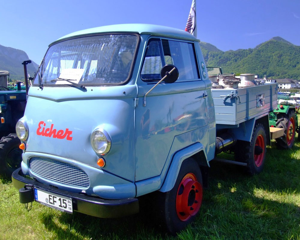 Quelle: selbst fotografiert, 05/2007 Fotograf: Späth Chr.